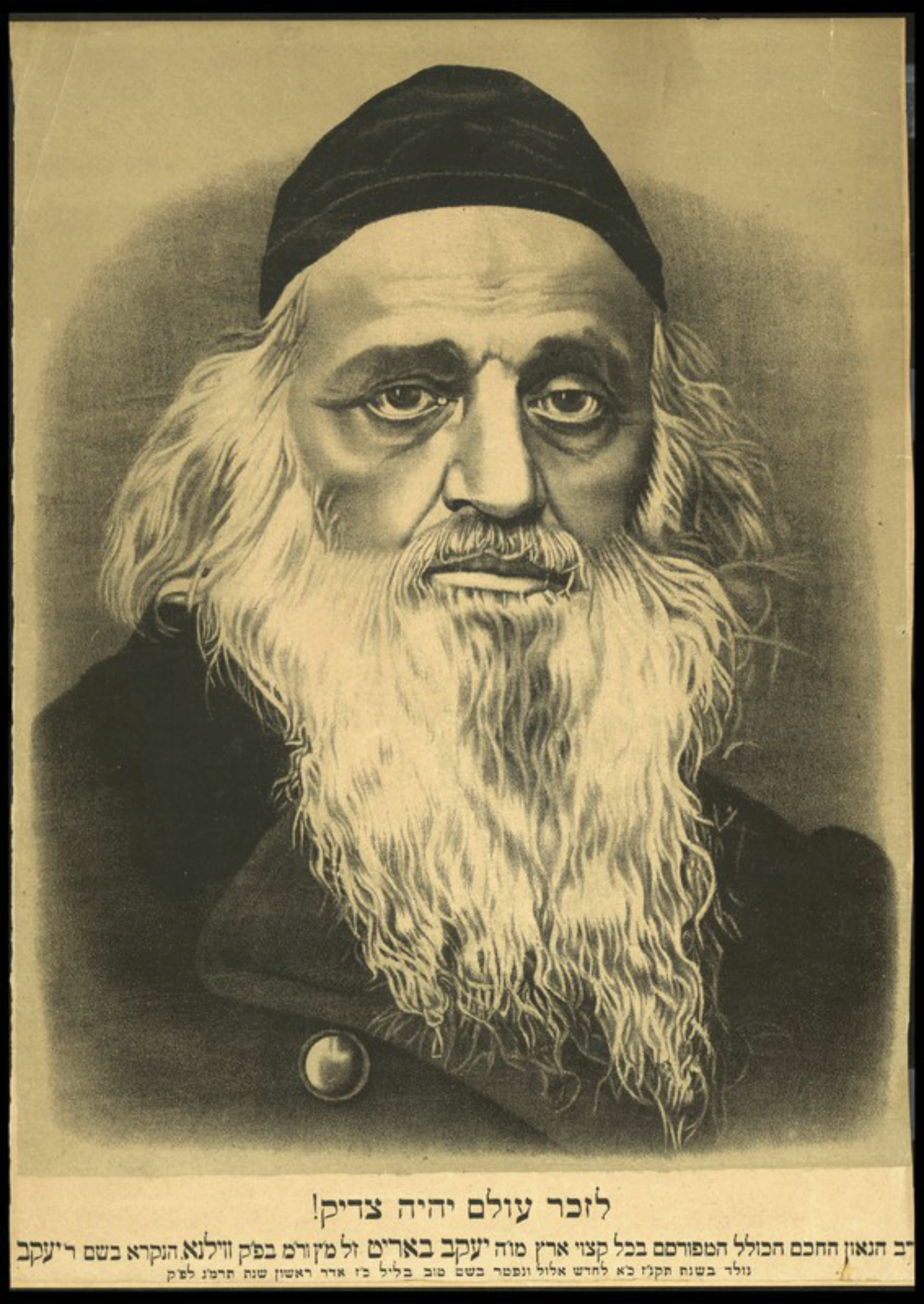 ליתוגרפיה בגודל 24X35 ס"מ, ובה ציור דיוקנו של הרב יעקב בריט [ר' יאנקעלע קאוונער]. תחת דיוקנו, נדפס ב